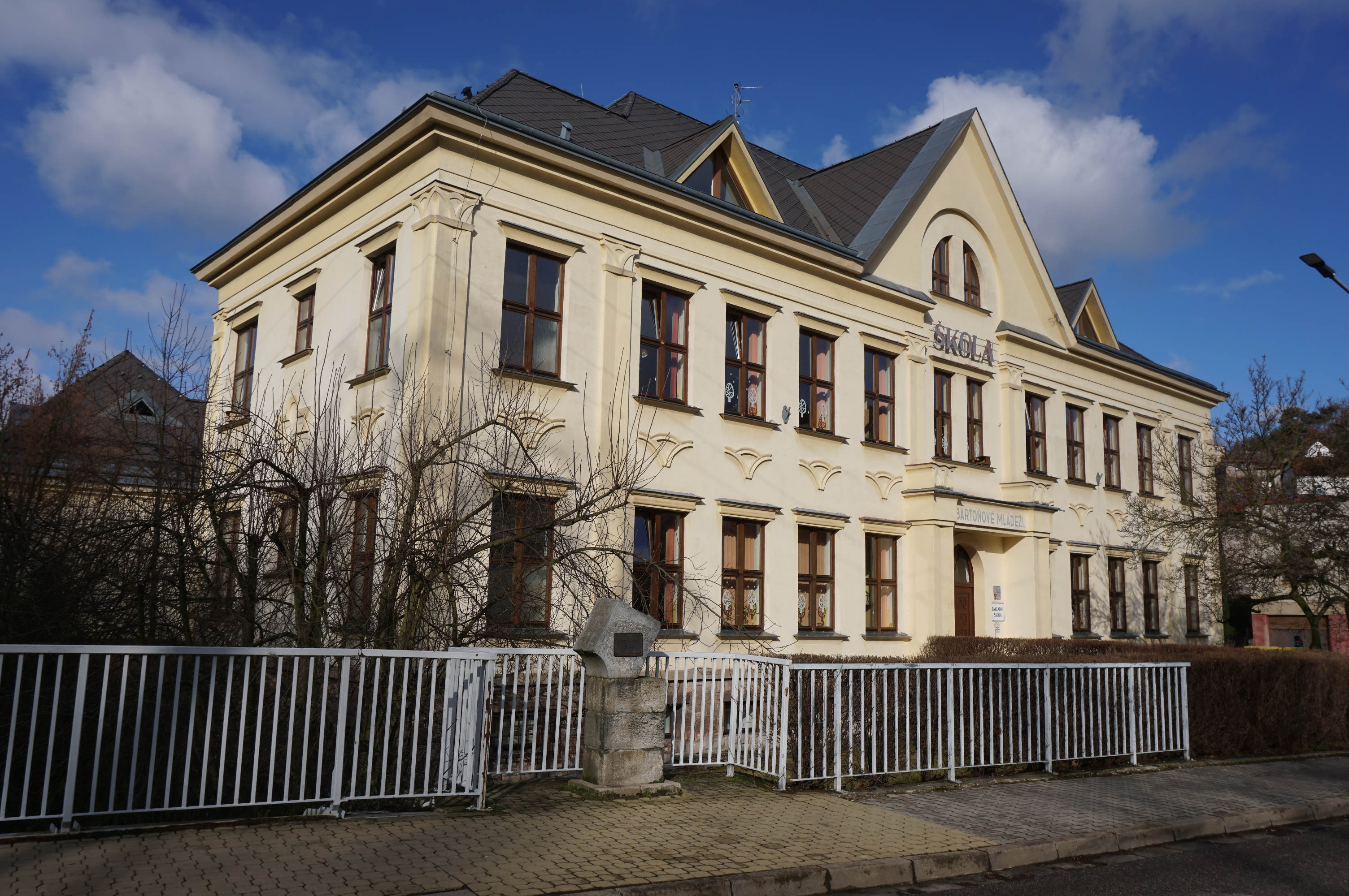 Staré Město nad Metují (Náchod) - škola čp. 121